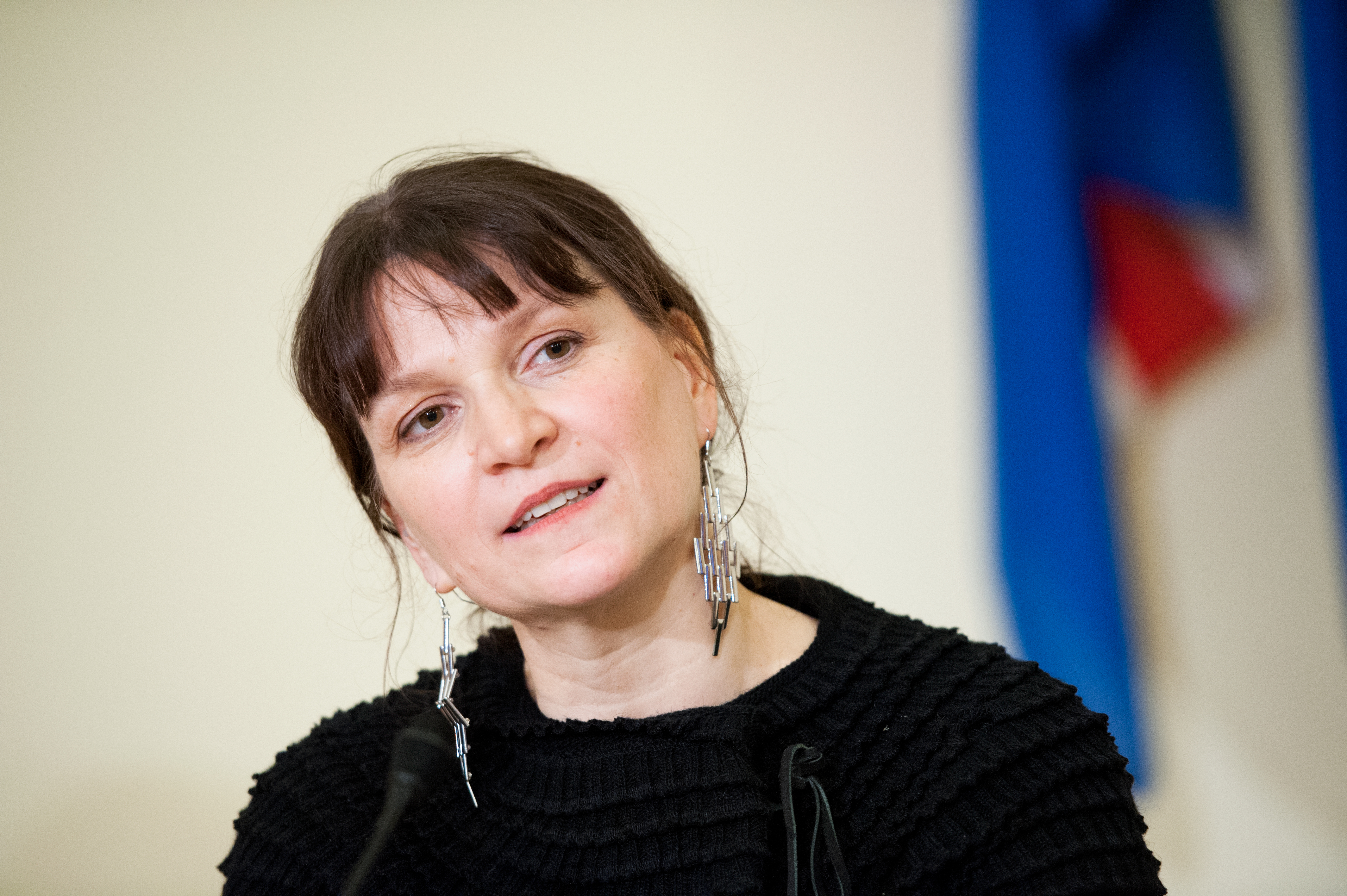 Merethe Lindstrøm, vinnare av Nordiska rådets litteraturpris 2012.